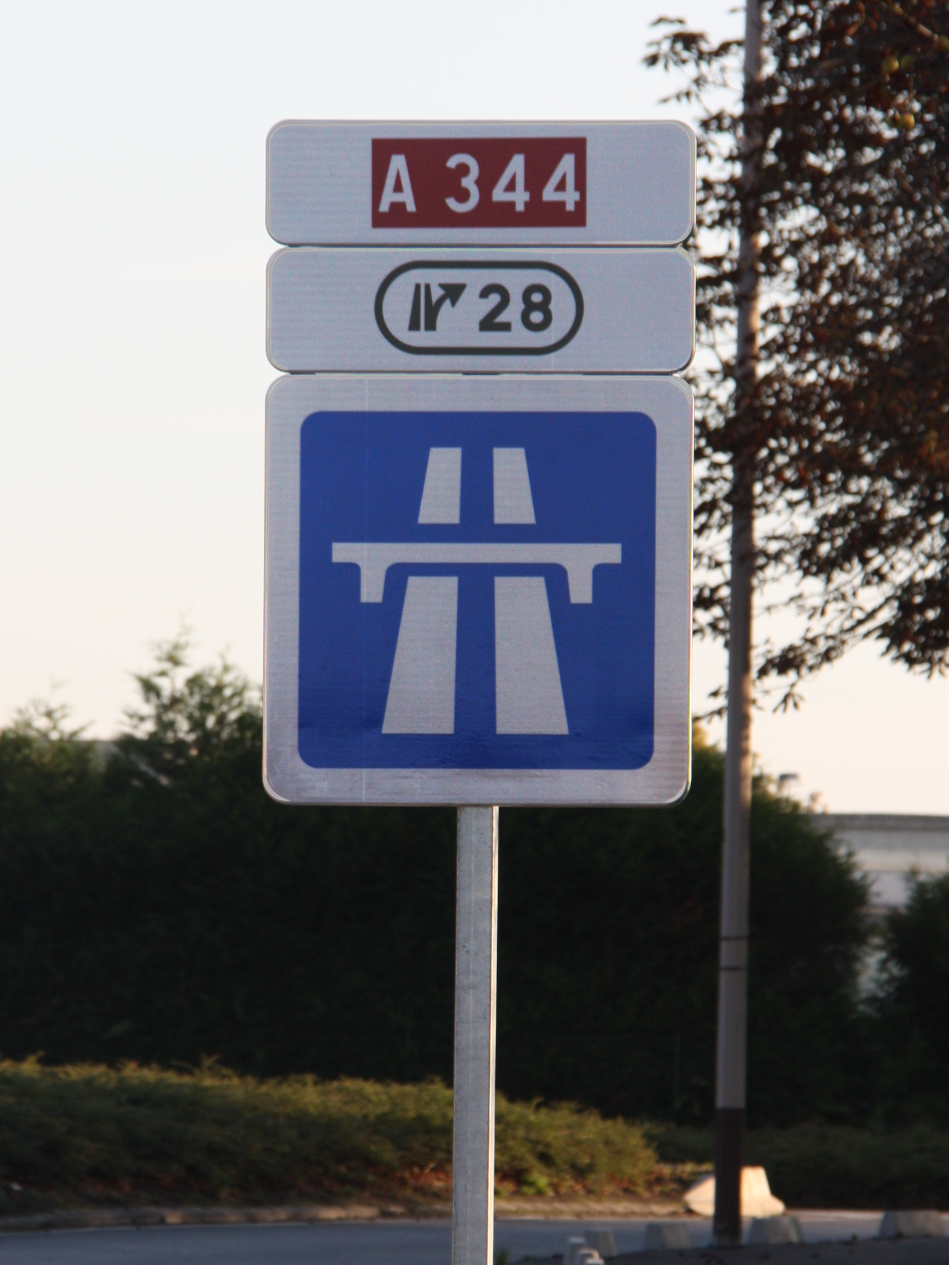 Signal routier annonçant l'entrée de l'autoroute A344 situé rue Gabriel Voisin